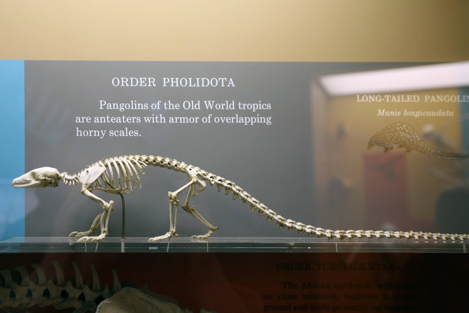 Manis tetradactyla skeleton